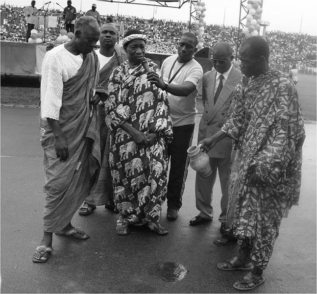 Le chef traditionnel de Bouaké et ses notables effectuant des libations à la cérémonie de la flamme de la paix à Bouaké (Centre de la Côte d'Ivoire)